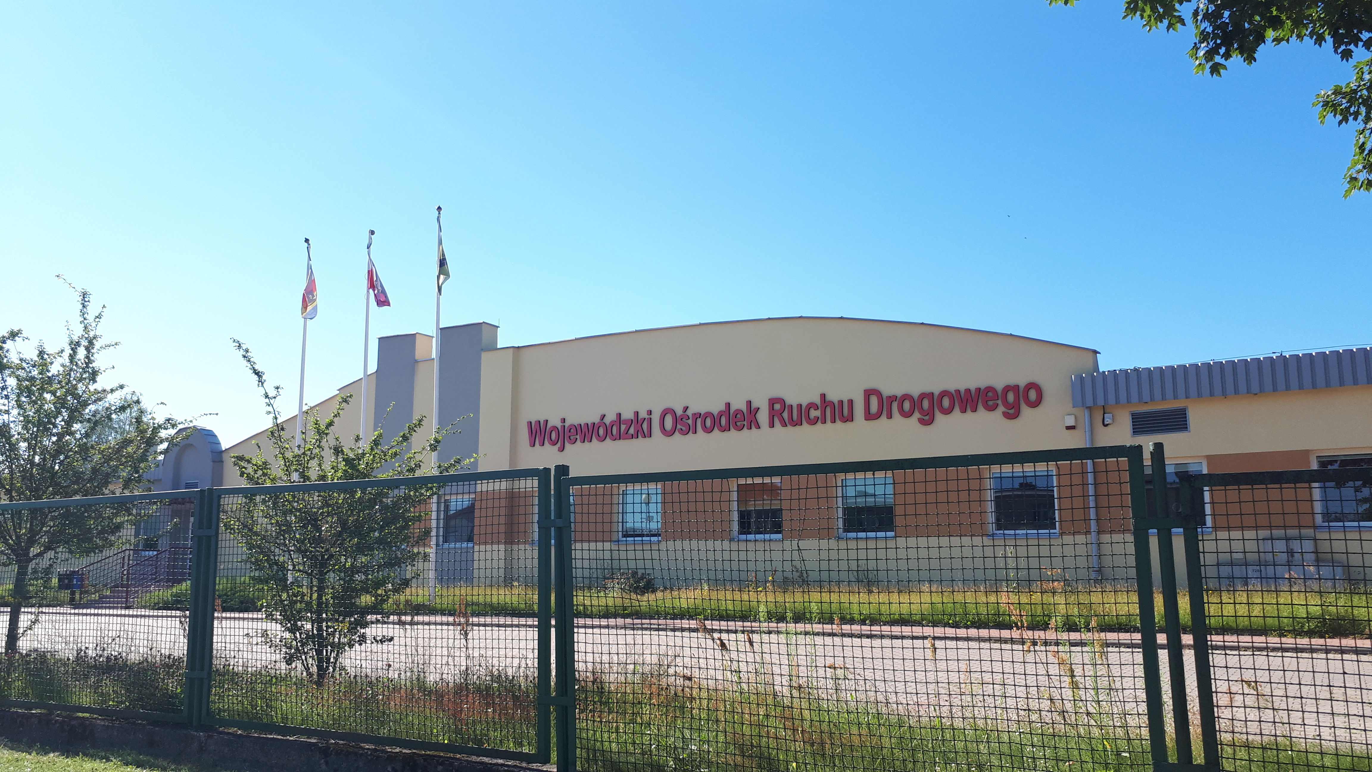 WORD w Białymstoku, ul. Wiewiórcza 64